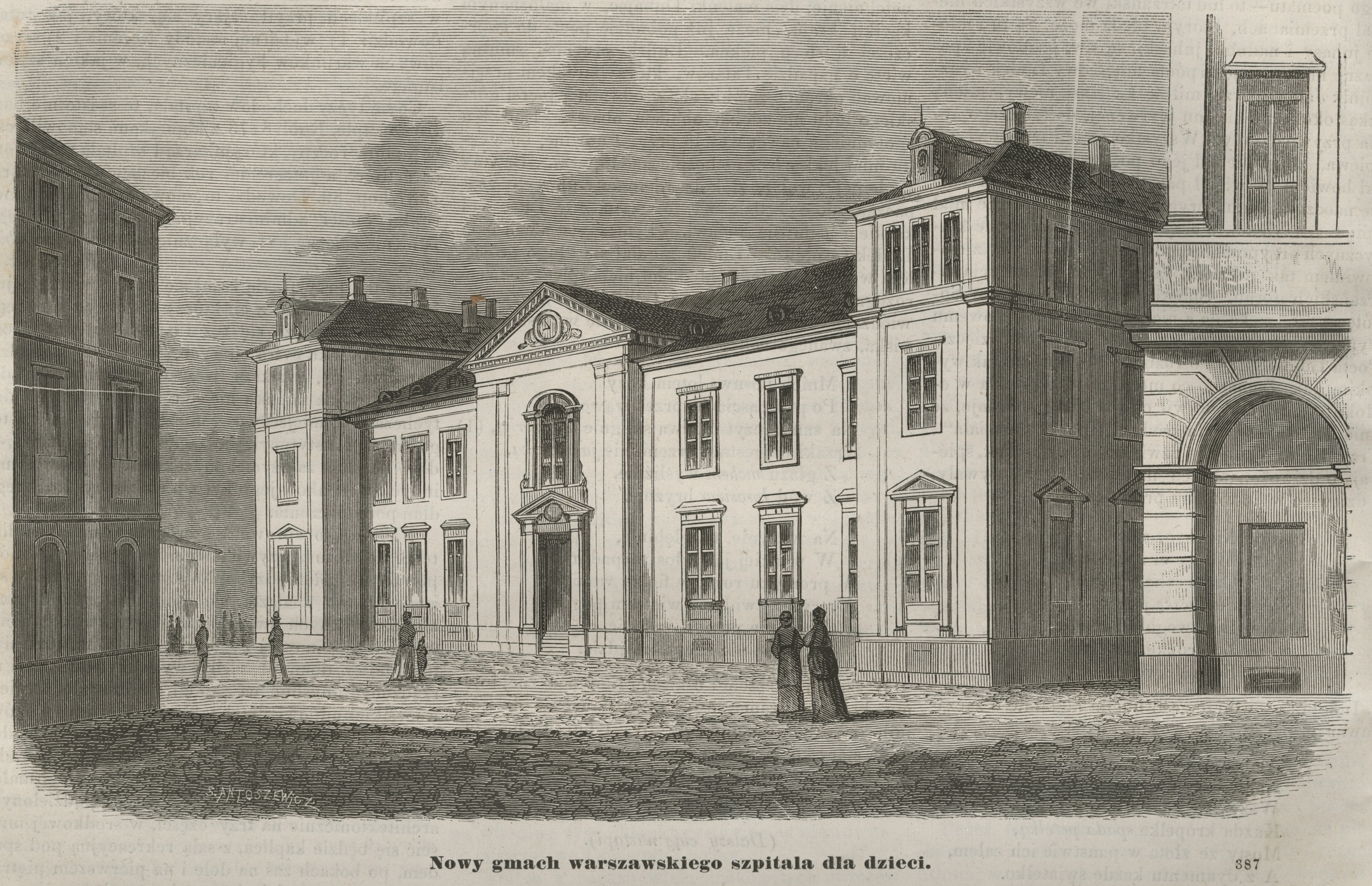 Nowy gmach warszawskiego szpitala dla dzieci